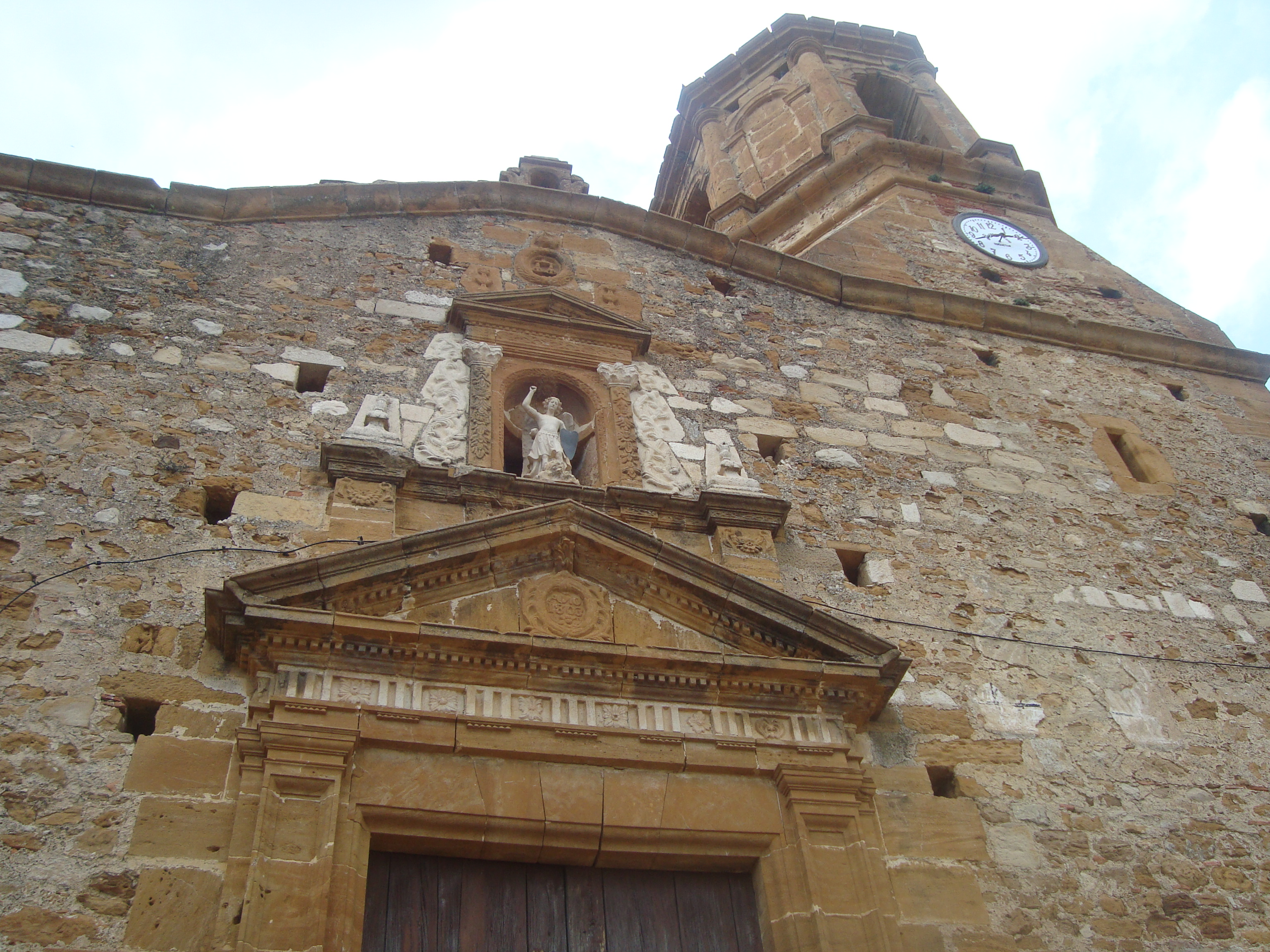 Església parroquial de Sant Miquel (la Serratella) 05.103-001.